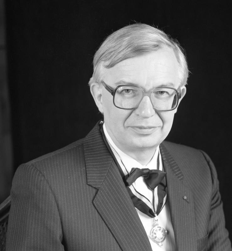 27.5.1991 Prof. Dr. Jean-Marie Lehn Chemiker, Straßburg/Frankreich Mitglied des Ordens Pour le Mérite für Wissenschaften und Künste